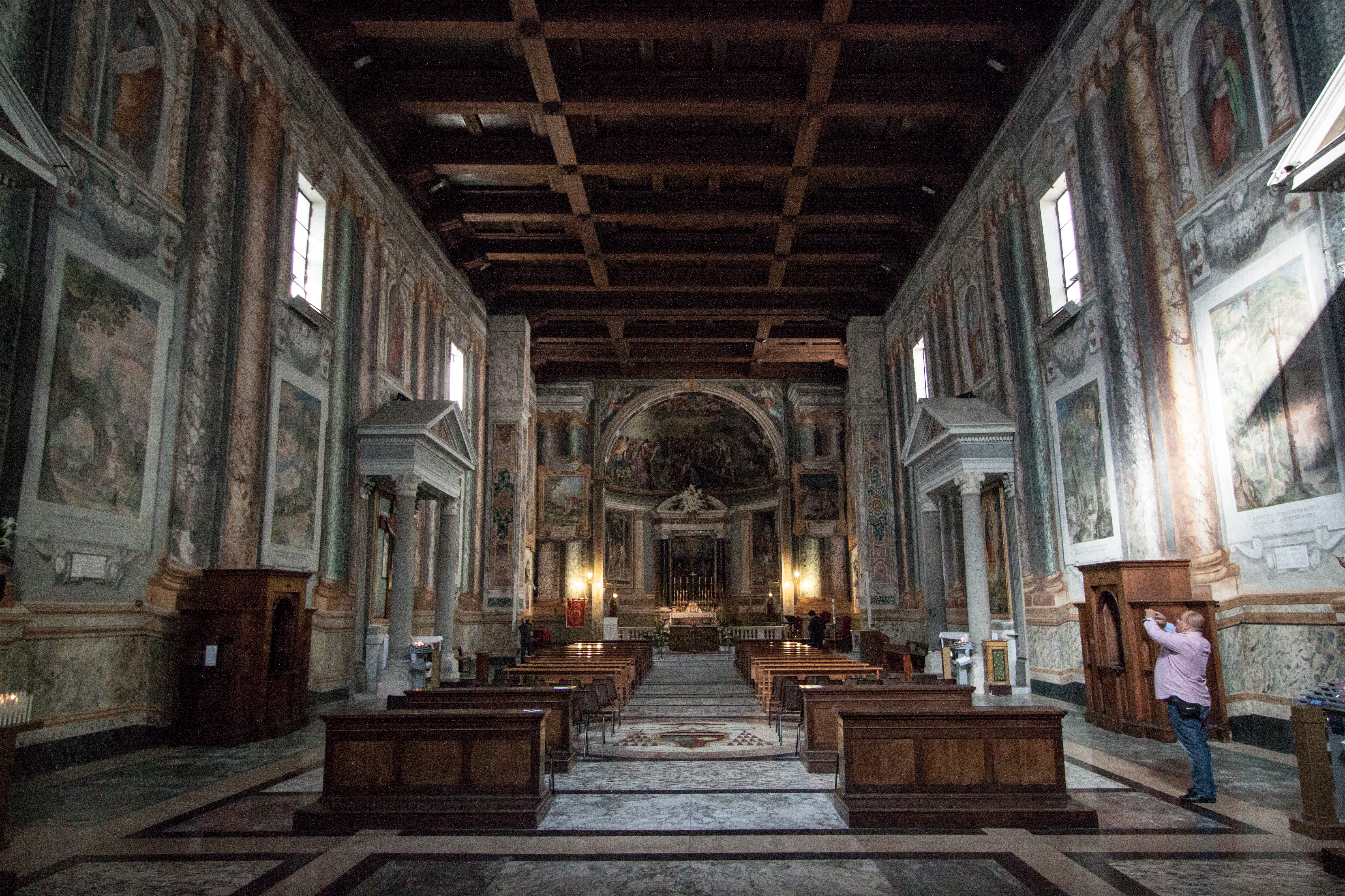 San Vitale Roma